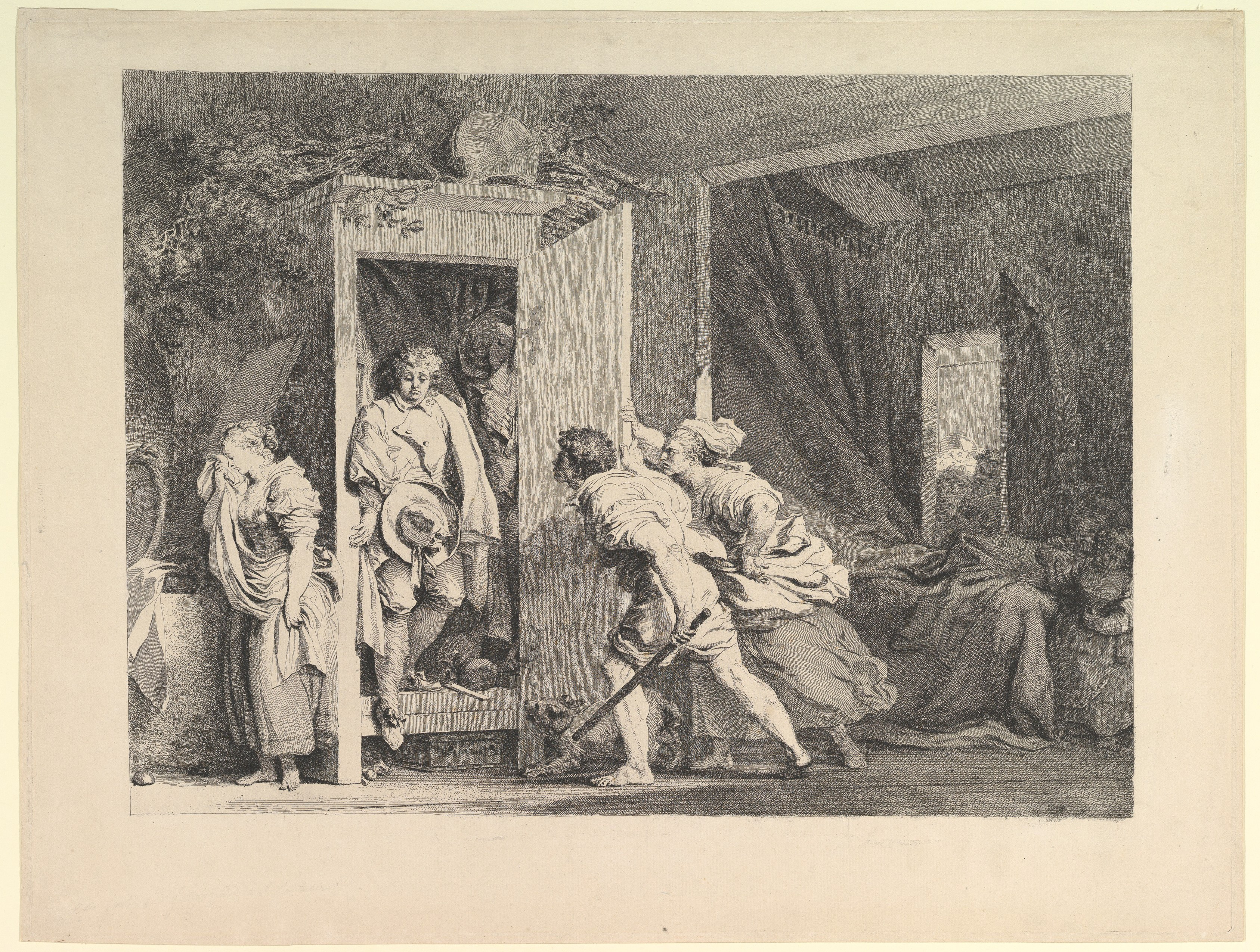 L'Armoire, eau-forte (état 1/4) de Jean-Honoré Fragonard (1778, MET Museum)